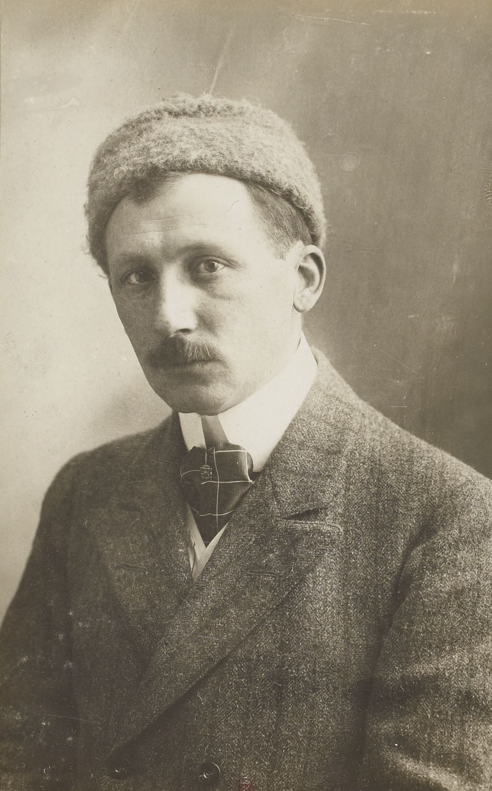 [Collection Jules Beau. Photographie sportive] : T. 35. Années 1908, 1909 et 1910 / Jules Beau